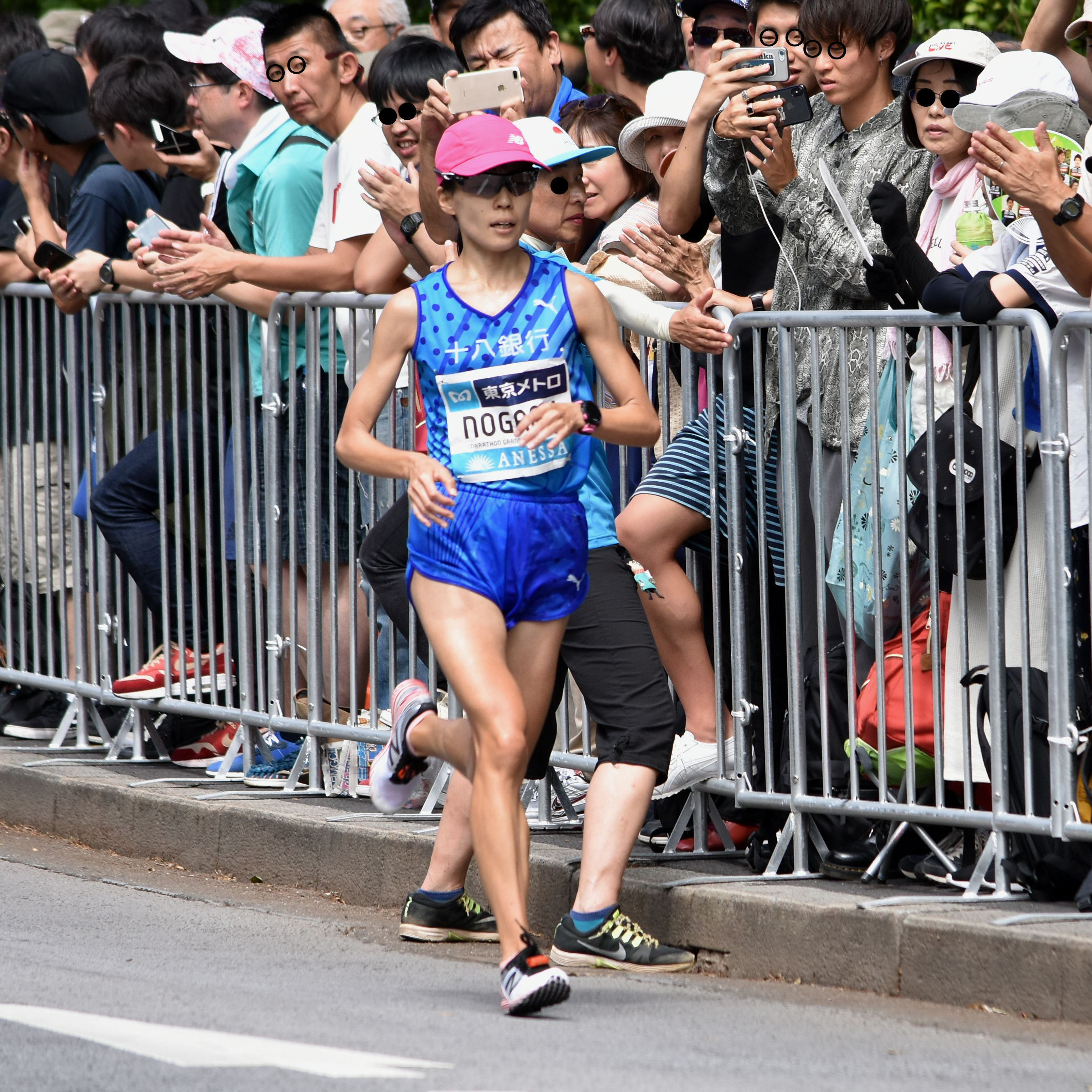 野上 恵子